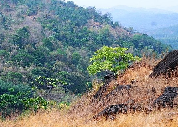 Poomala, Kerala